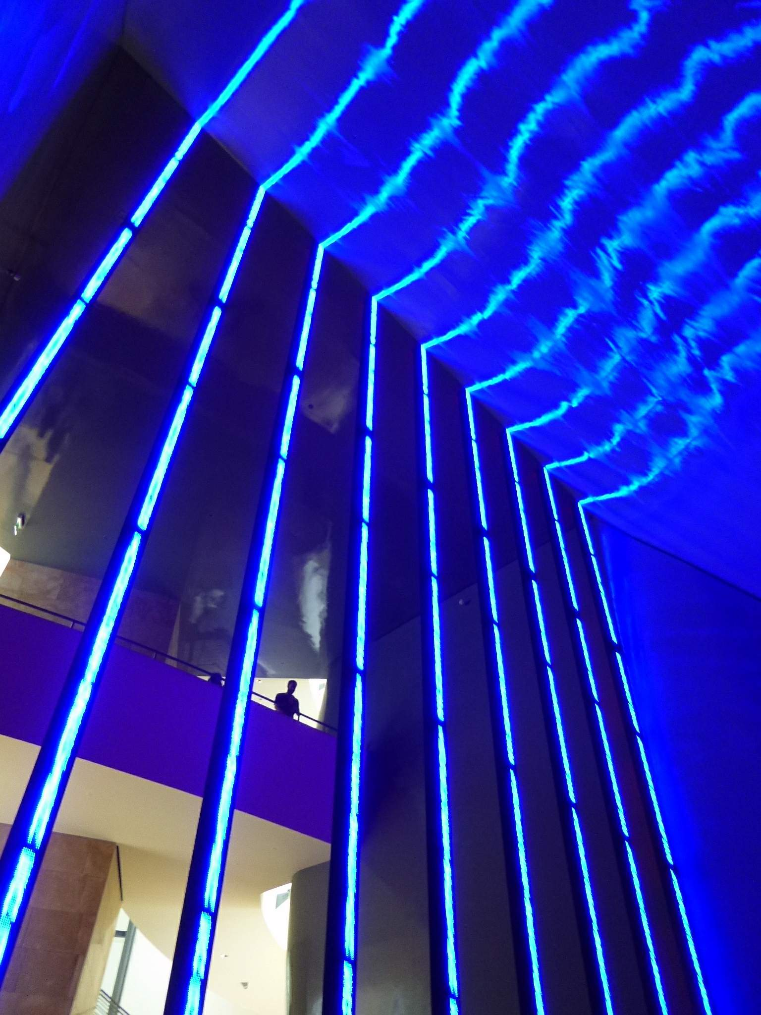 'Installation for Bilbao', de Jenny Holzer, en el Museo Guggenheim Bilbao